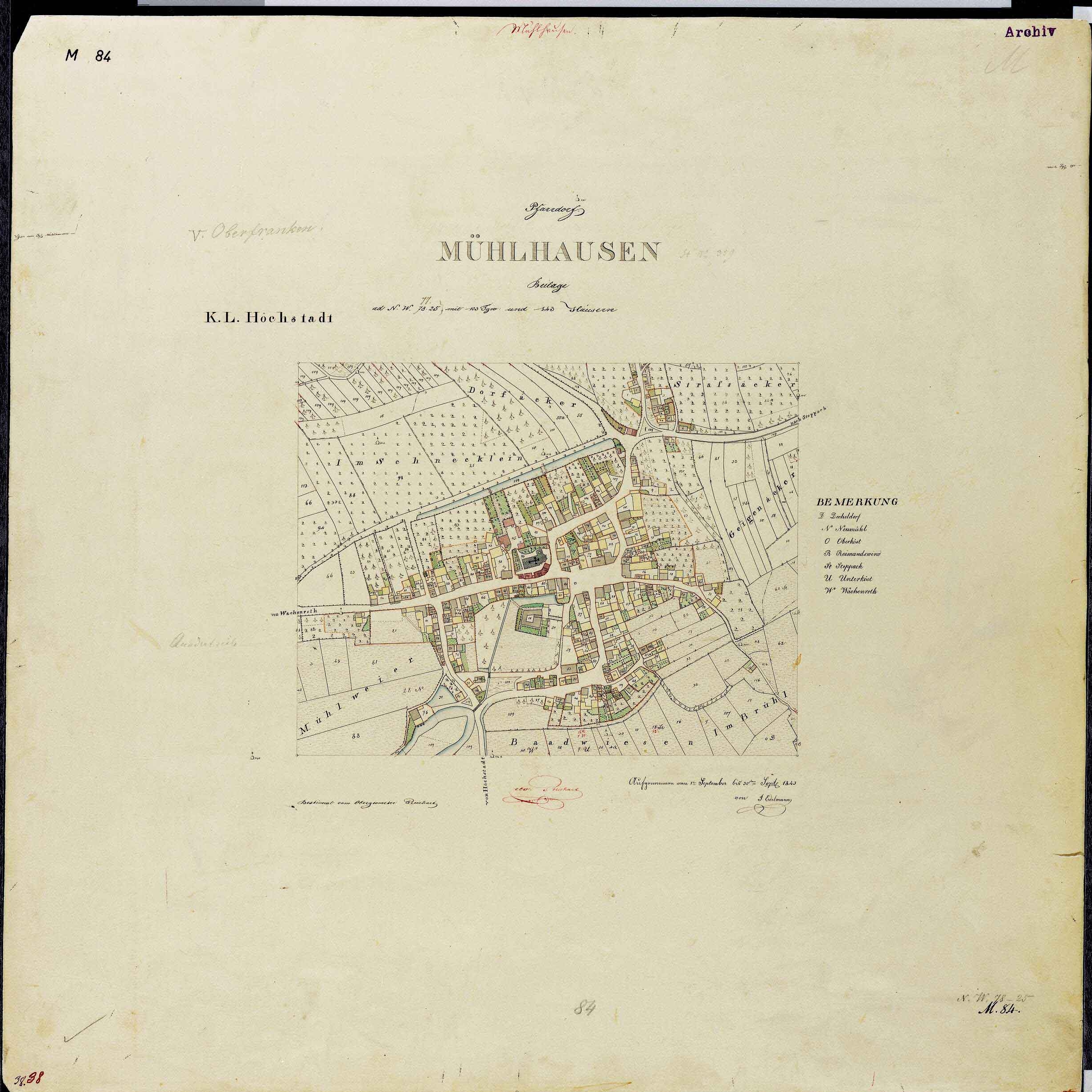 Ortsblatt des Königreichs Bayern: Mühlhausen in Mittelfranken